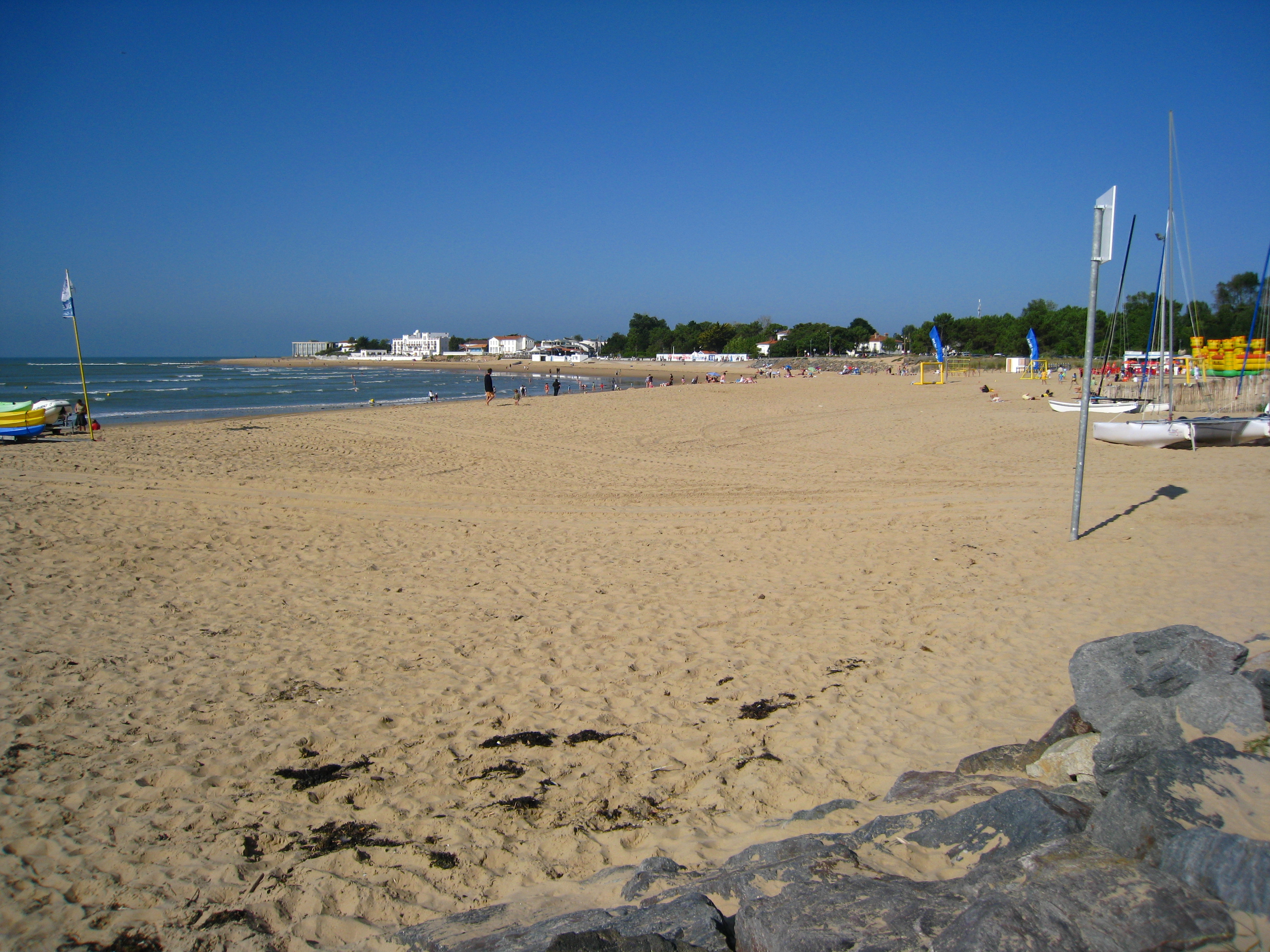 place centrale/principale de la Tranche sur Mer